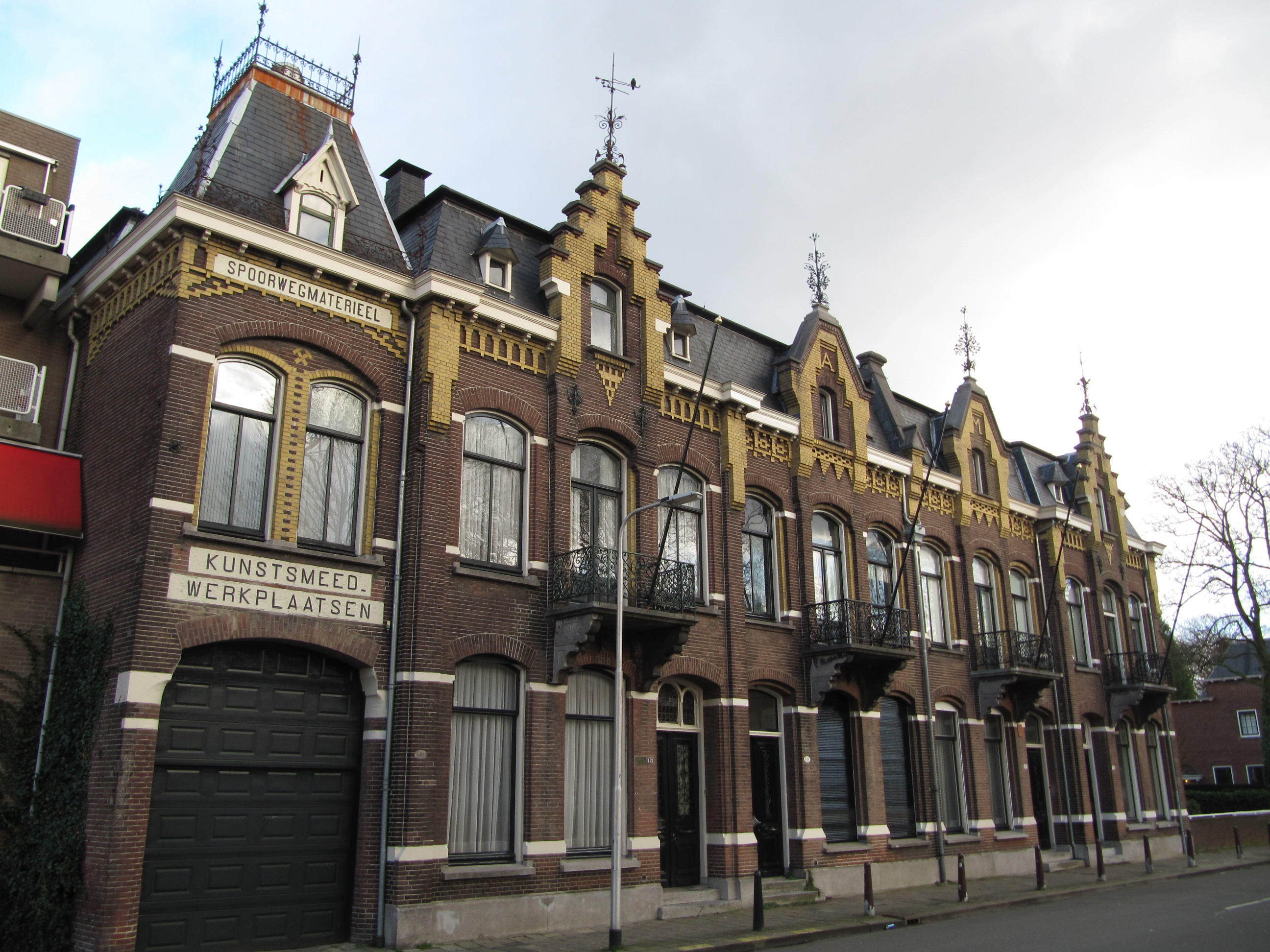 RM521182 Tilburg - St. Josephstraat 115.jpg